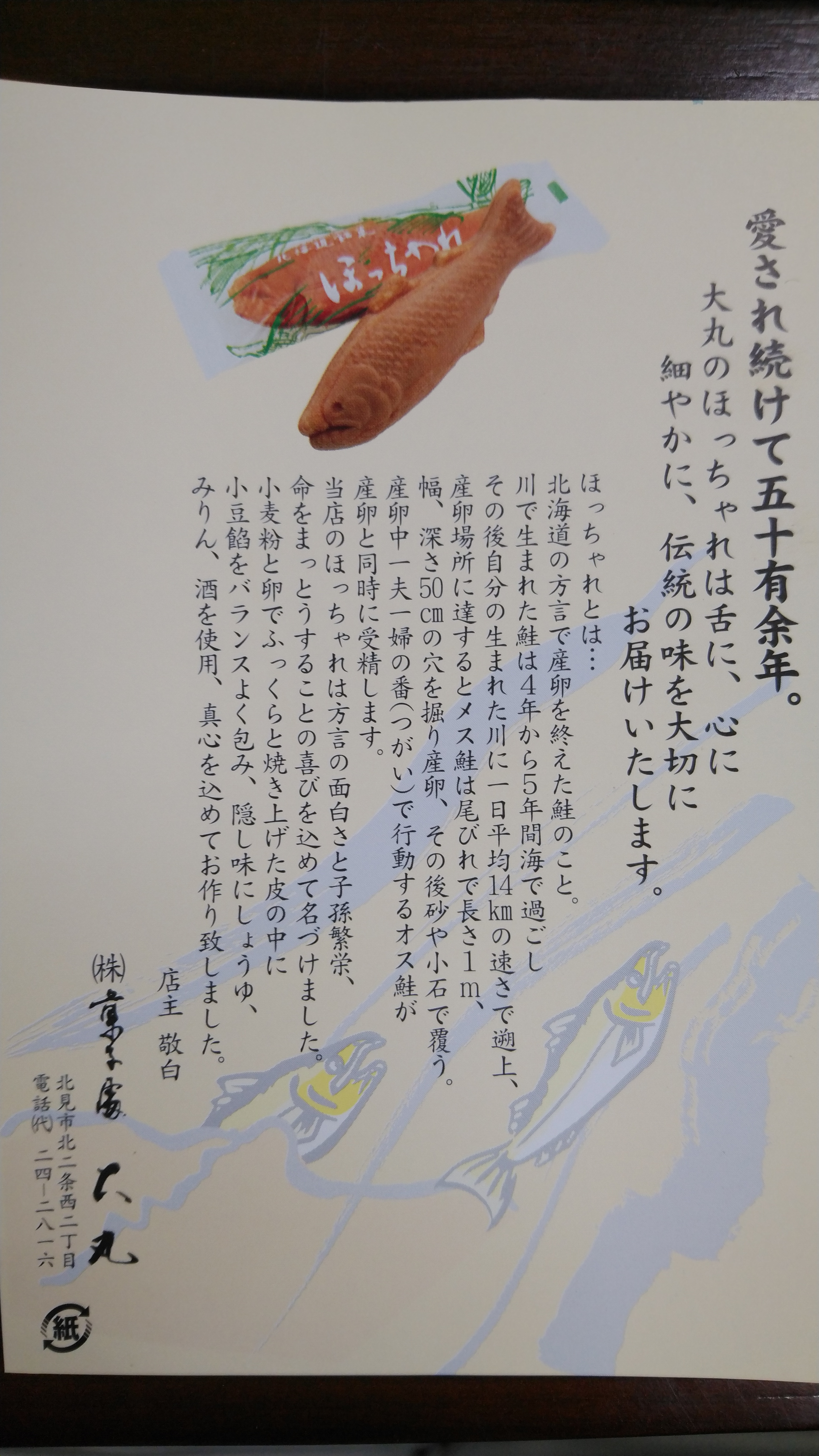 箱売り商品内包のほっちゃれについての説明文